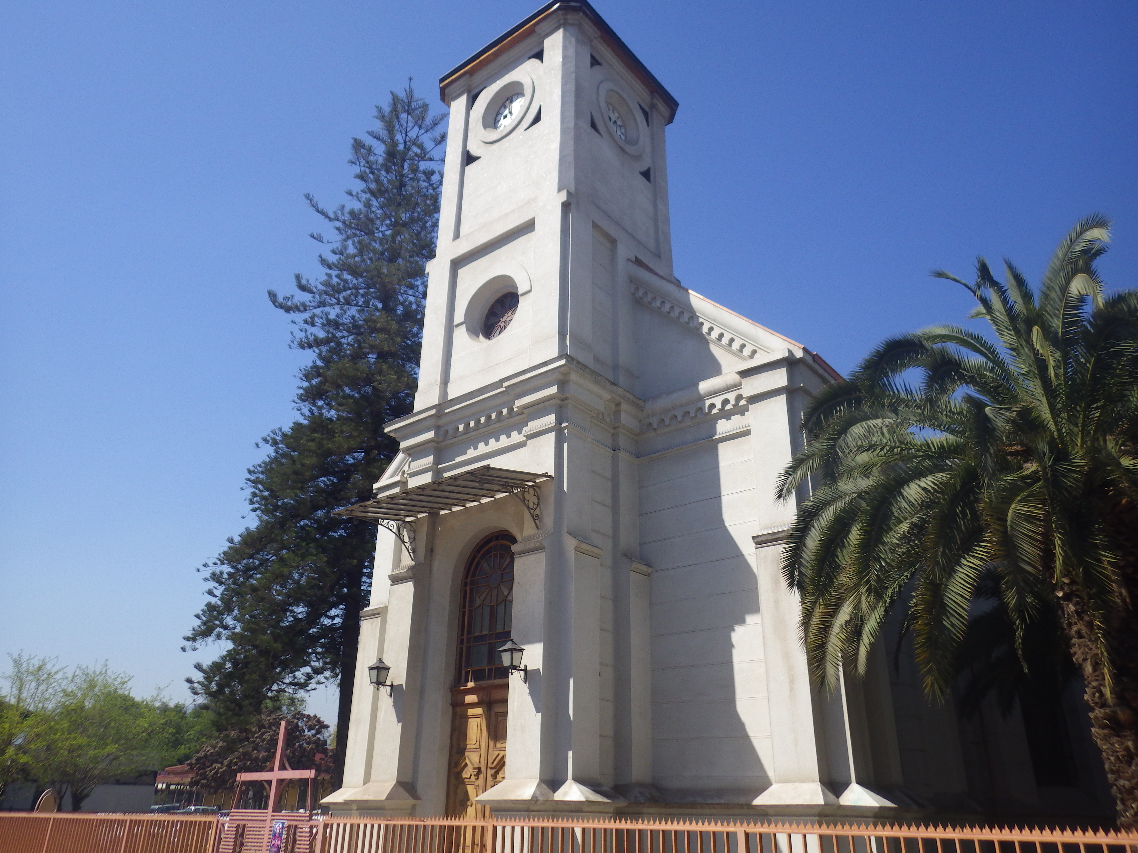 Capilla del antiguo Lazareto de San Vicente de Paul This is a photo of a national monument in Chile: 837